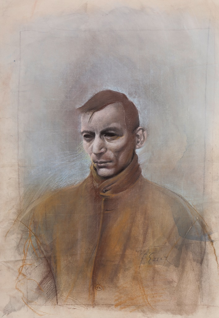 Georg Esser, Selbstbildnis, 43x62 cm, 1998, Kreide Esserverzeichnis (EVZ) Nr. 1.19